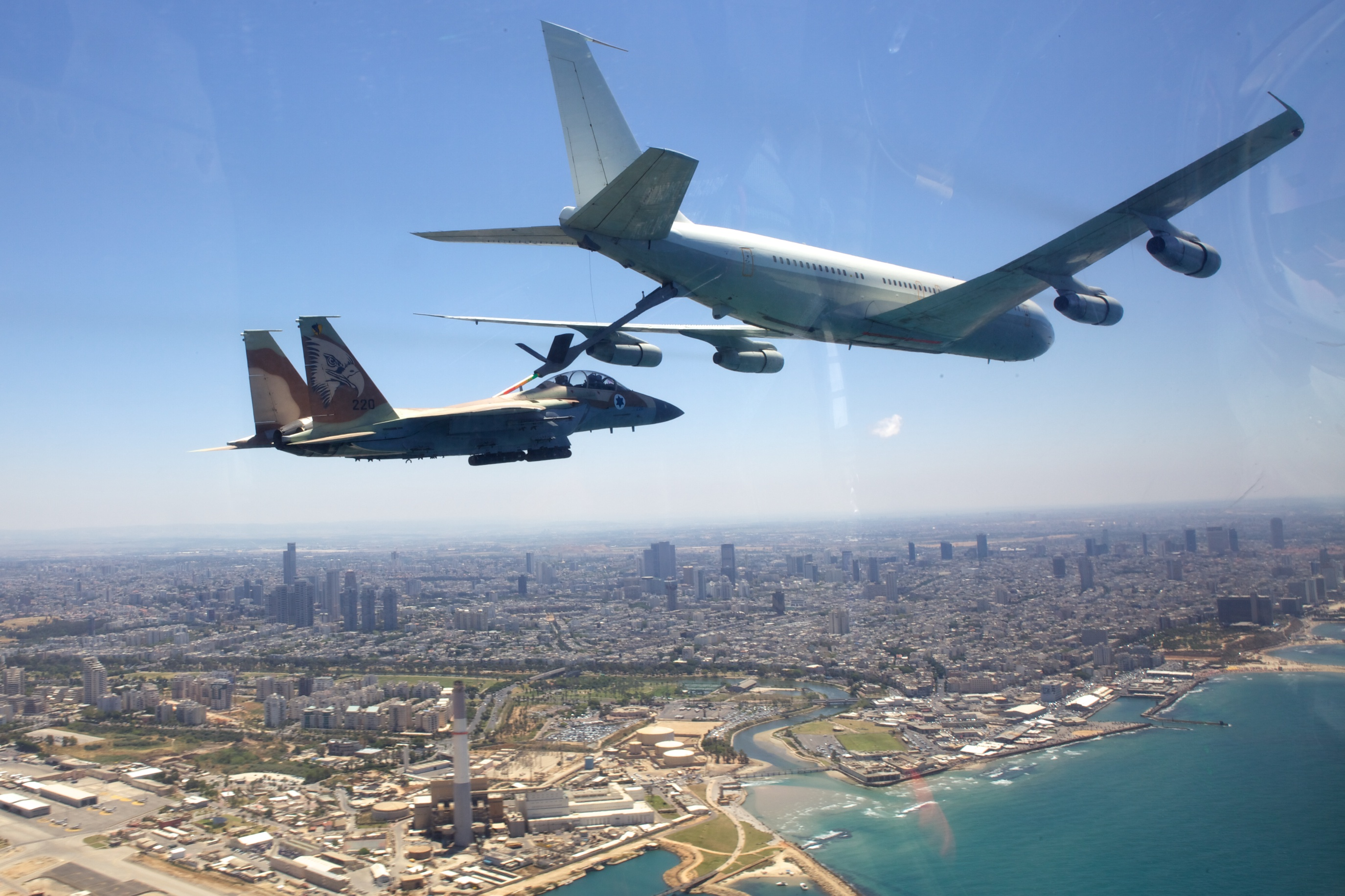 May 10, 2011. The Israeli Air Force crosses all of Israel from north to south, in honor of the country's 63rd Independence Day. Pictured: A "Re'em" plane (Boeing 707) refueling a "Ra'am" plane (F-15I) above the beaches of Tel-Aviv. היום ה' באייר תשע"א נערך מטס ההצדעה המסורתי של חיל האוויר בשמי הארץ, לרגל יום העצמאות ה- 63 למדינת ישראל. בתמונה ניתן לראות את מטוס ה"ראם" (בואינג 707) של חיל האוויר מתדלק את מטוס "הרעם" (F15I) מעל חופי תל אביב.